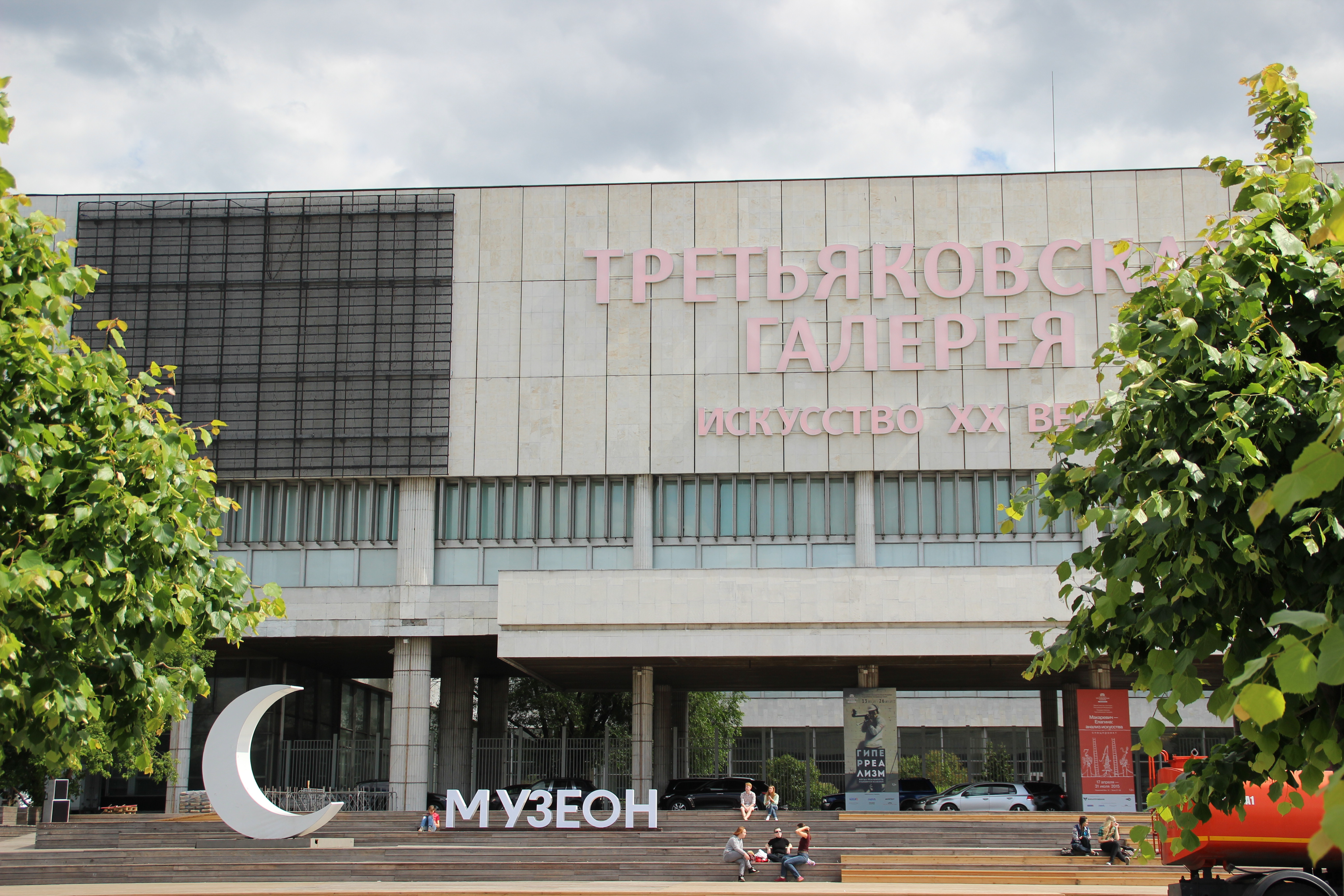 Третьяковская галерея в парке Музеон, июнь 2015